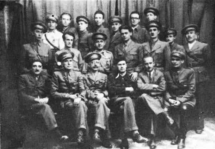 Srpskohrvatski / српскохрватски: Jugoslovenski borci i rukovodioci u Španiji, Albacete 1937. Slika je nastala za vrijeme posjete Augusta Cesarca i Rodoljuba Čolakovića. Gornji red od lijeva na desno: 1. Penko Mitrov, 2. Franjo Ogulinac Seljo, 3. Vladimir Kurt »Majder«, 4. Mario Klekler, 5. Josip Lončarić »Babović«, 6, Franjo Porer »Roman«, 7. Dimitrije Stanisavljević »Kuka« i 8. Milan Ćopić "Marijan". Srednje red od lijeva u desno: 9. Stevo Samardžić, 10. Sveto Đorđević, 11. Mirko Marković, 12. Milić, 13. Ivan Rukavina, 14. potpukovnik Donji red od desna u lijevo: 15. Dimitrije Georgijević, 16. Božidar Maslarić. 17. Dragutin Gustinčić, 18. Rodoljub čolaković. 19. August Cesarec, 20. Nikola Kovaćević »Nikita«.